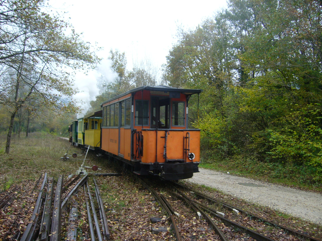 Description un train quitte Montalieu Licence Creative Commons Attribution ShareAlike 2.5. un train quitte Montalieu